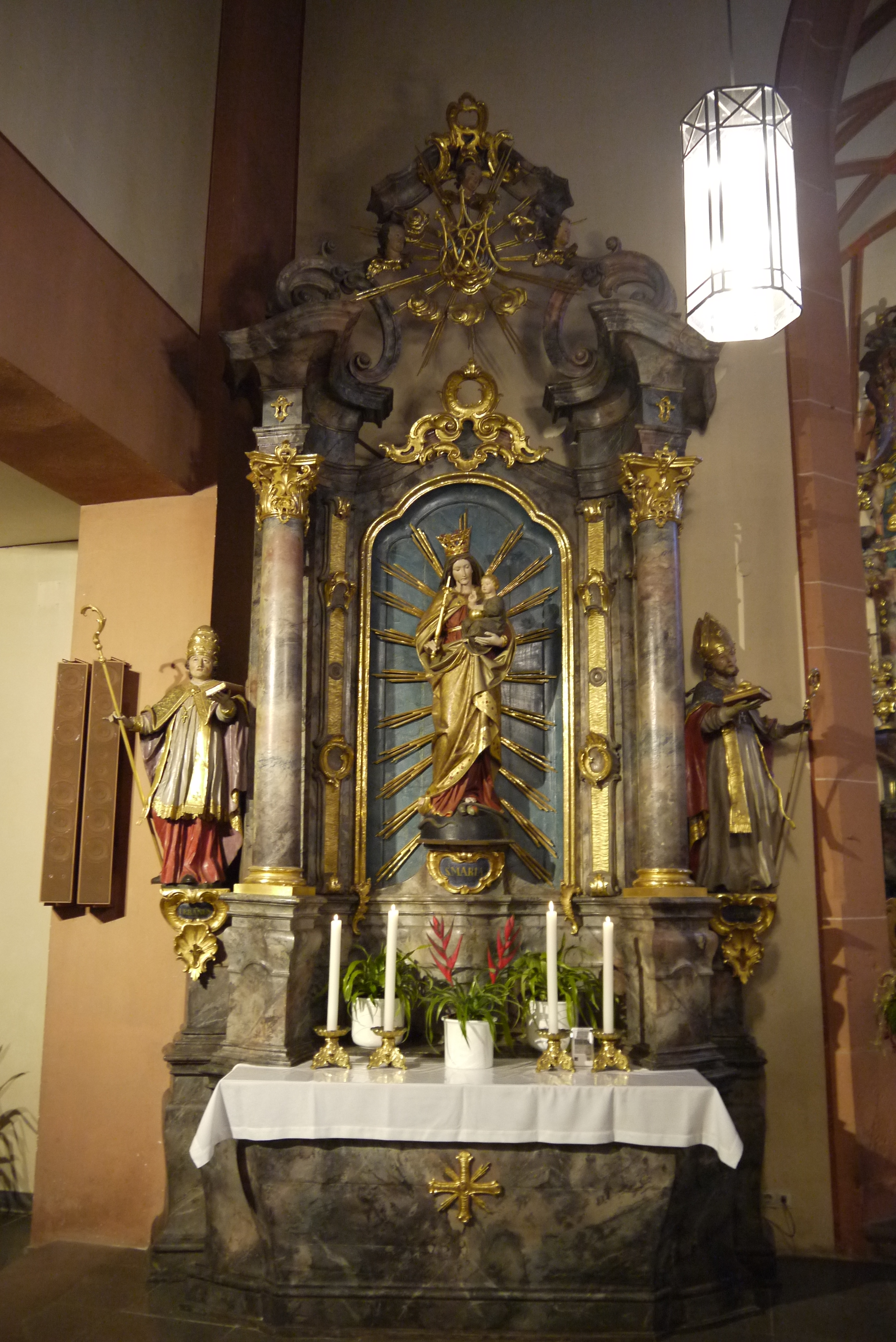 Kirche St. Martin Külsheim